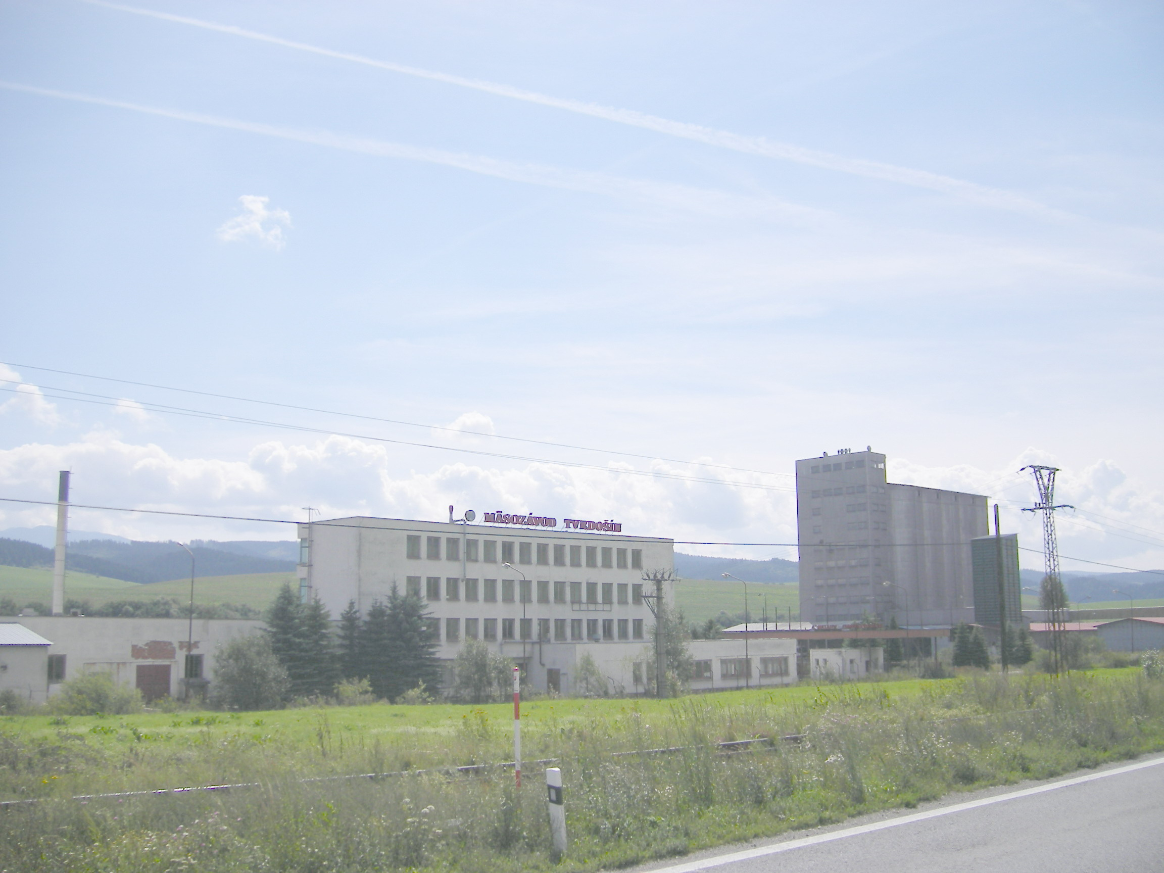 Mäsozávod Tvrdošín (meat factory)